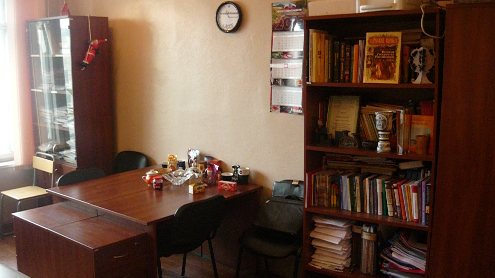 Кафедра Истории, философии и культурологии в СПбГТУРП.